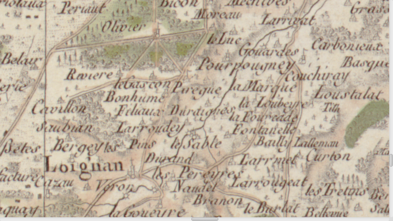 Carte de Cassini, feuille n°104, 1756 : zoom sur la traversée de Léognan par l'Eau Blanche.